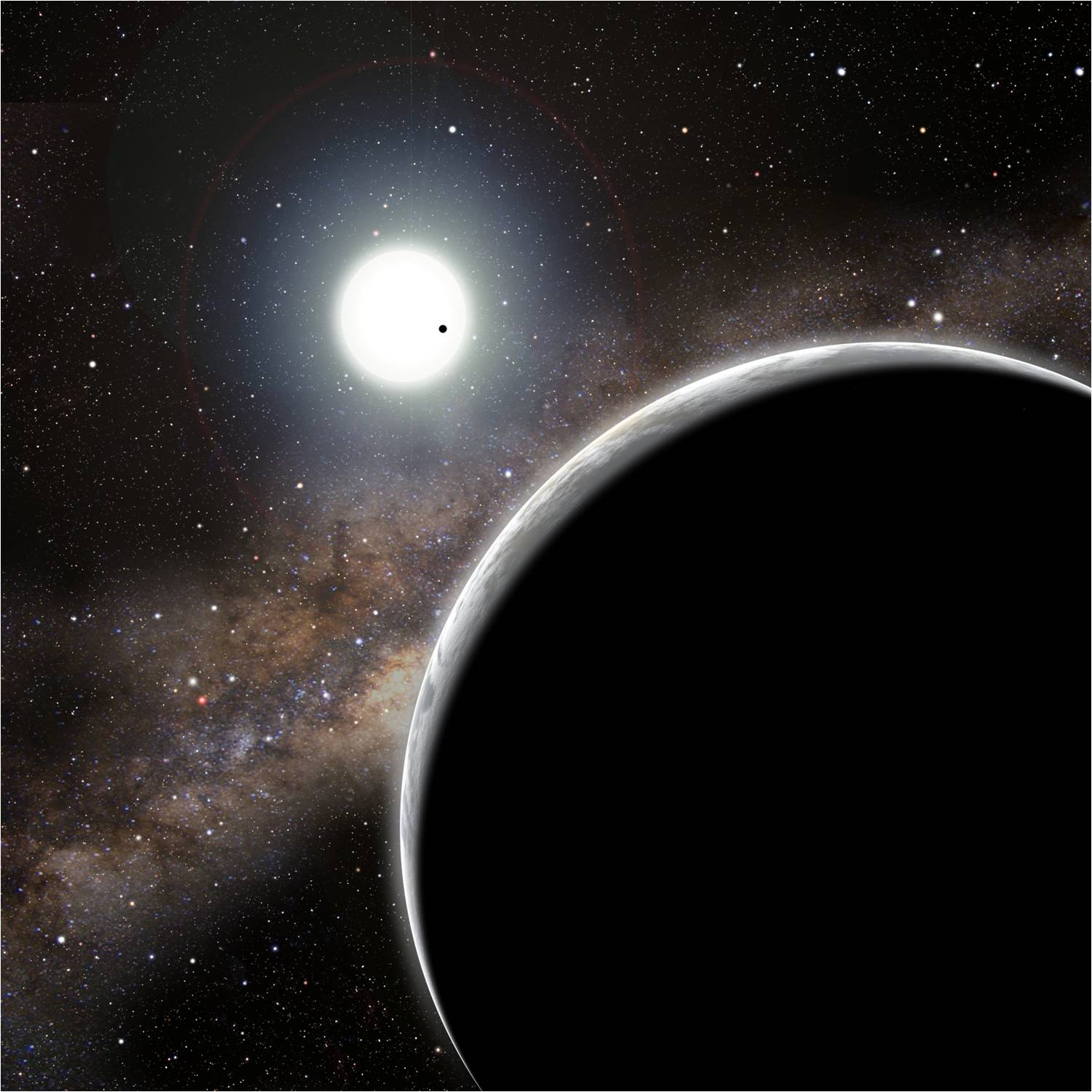 What does Kepler-19c look like? We don't know—we have have very few clues. “Kepler-19c has multiple personalities consistent with our data. For instance, it could be a rocky planet on a circular 5-day orbit, or a gas-giant planet on an oblong 100-day orbit,” said co-author Daniel Fabrycky of the University of California, Santa Cruz (UCSC). This a depiction of the Kepler-19 system by artist David Aguilar